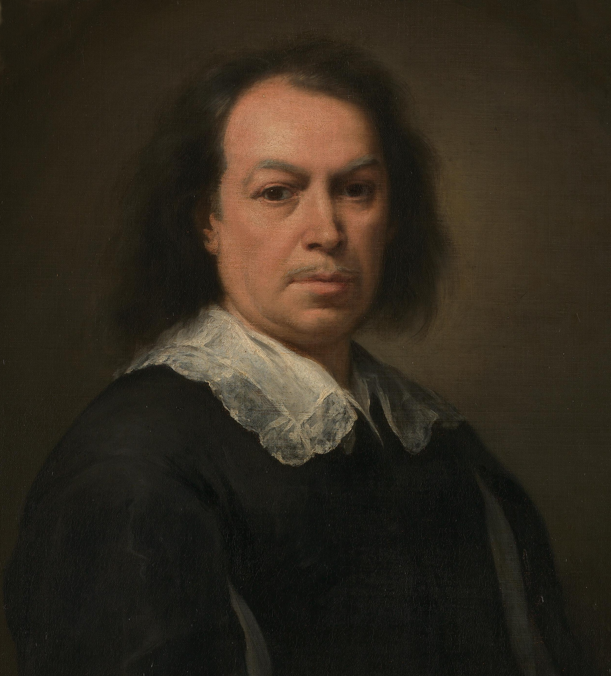 Self-portrait, Portrait of Bartolomé Esteban Murillo